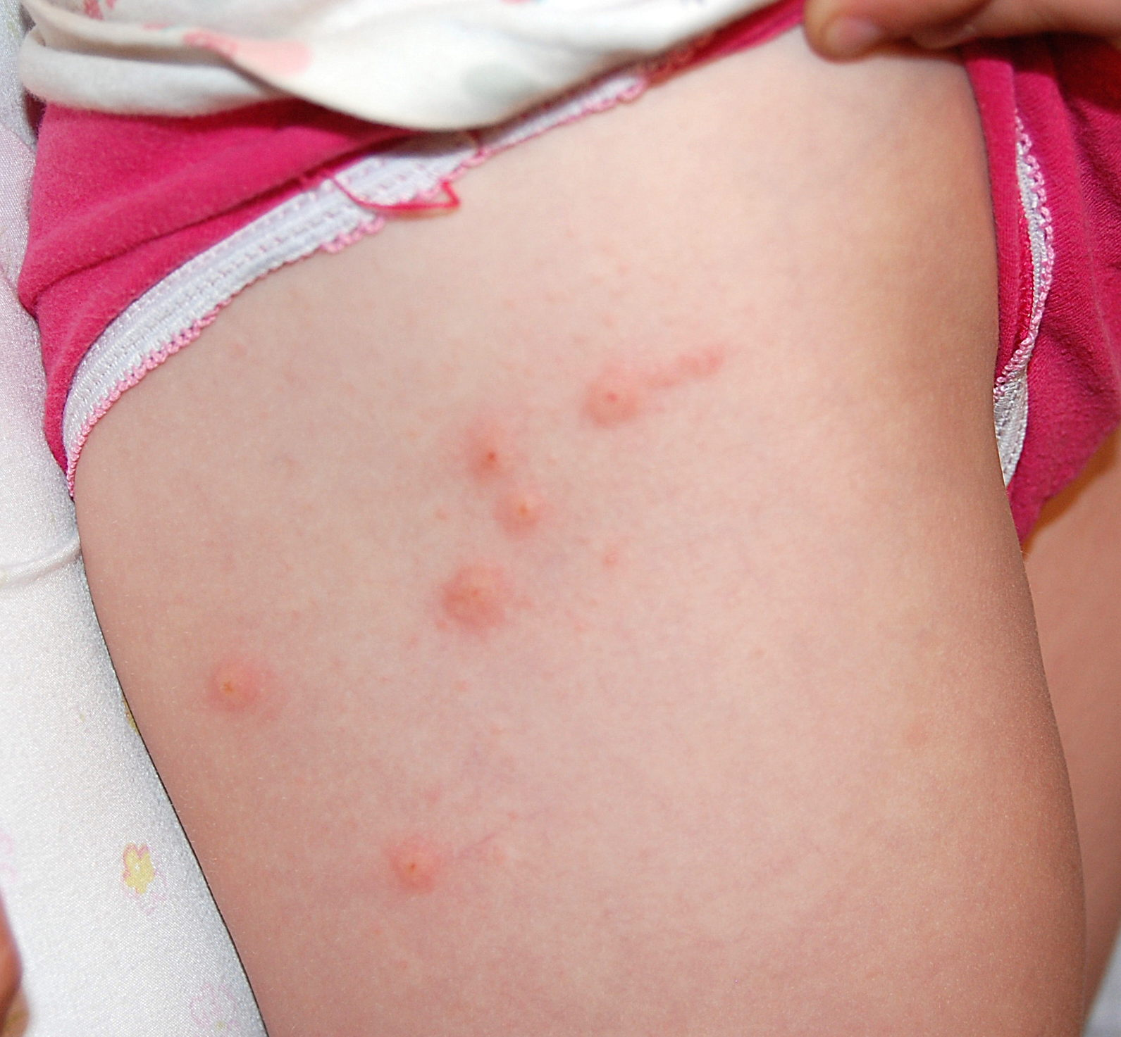 Walon: dôsses co 4 djoûs après hagneure d' ene biesse dins on lét